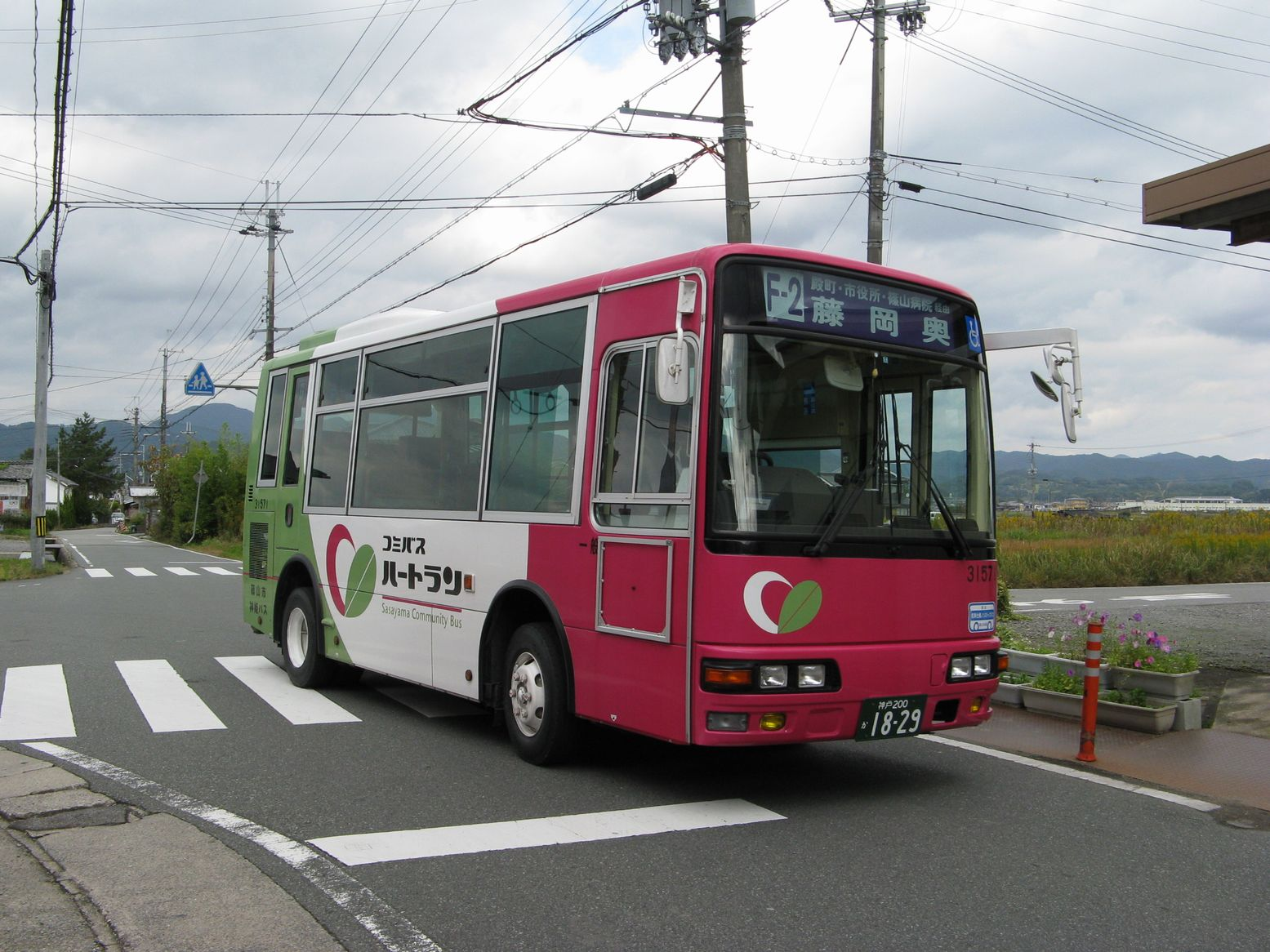 コミバスハートラン F-2ルート 小枕口バス停付近にて